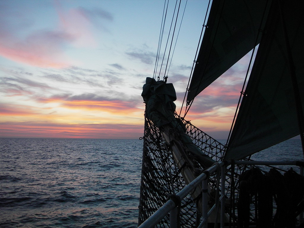 Die Alexander von Humboldt („Alex“) im Sonnenaufgang: Bugspriet/Klüverbaum